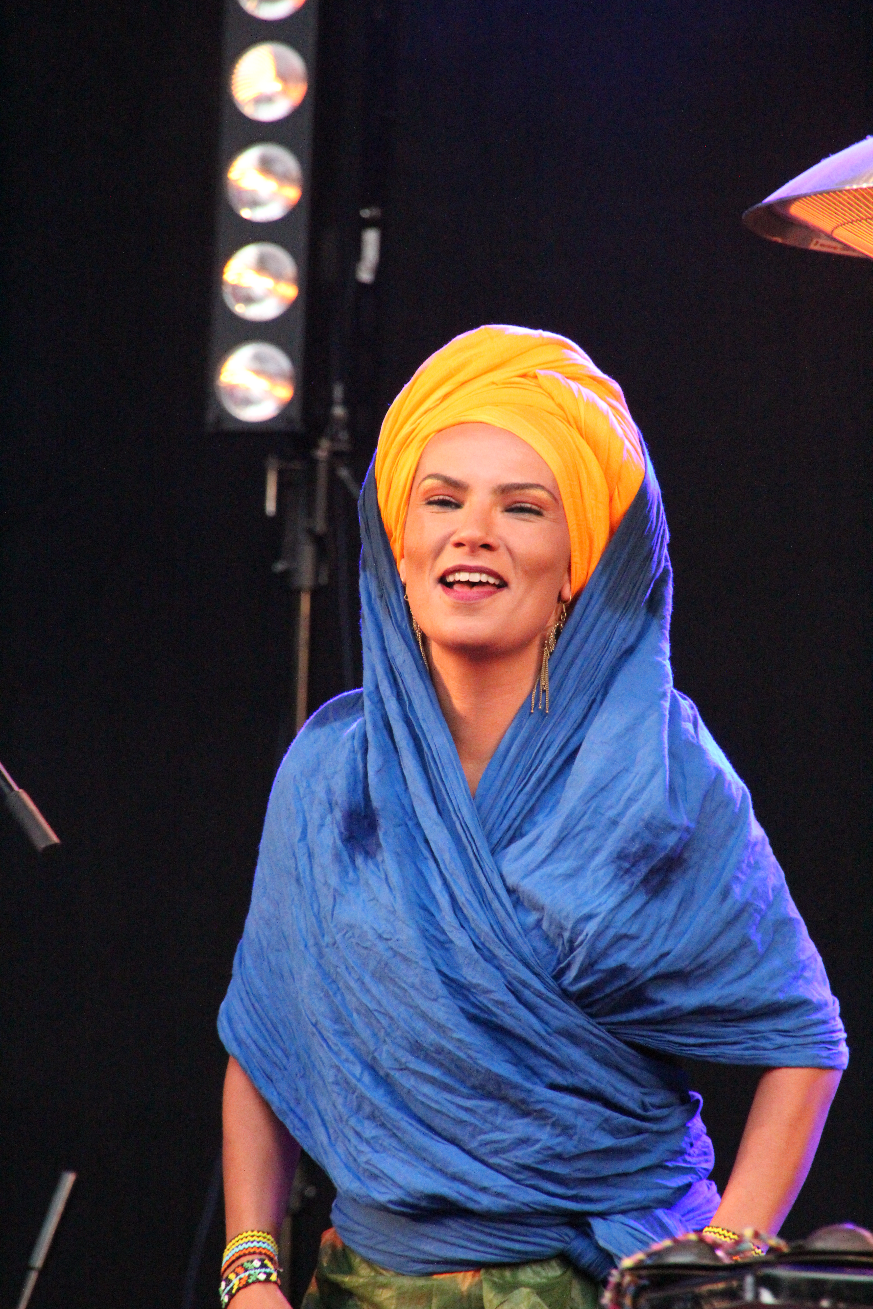 Bildinhalt: Die marokkanische Sängerin Oum (Oum El Ghaït Benessahraoui, geboren 18. April 1978 in Casablanca) bei einem Auftritt im Frankfurter Palmengarten Aufnahmeort: Frankfurt am Main, Deutschland Die dargestellte Person wurde bei einem öffentlichen Auftritt fotografiert.